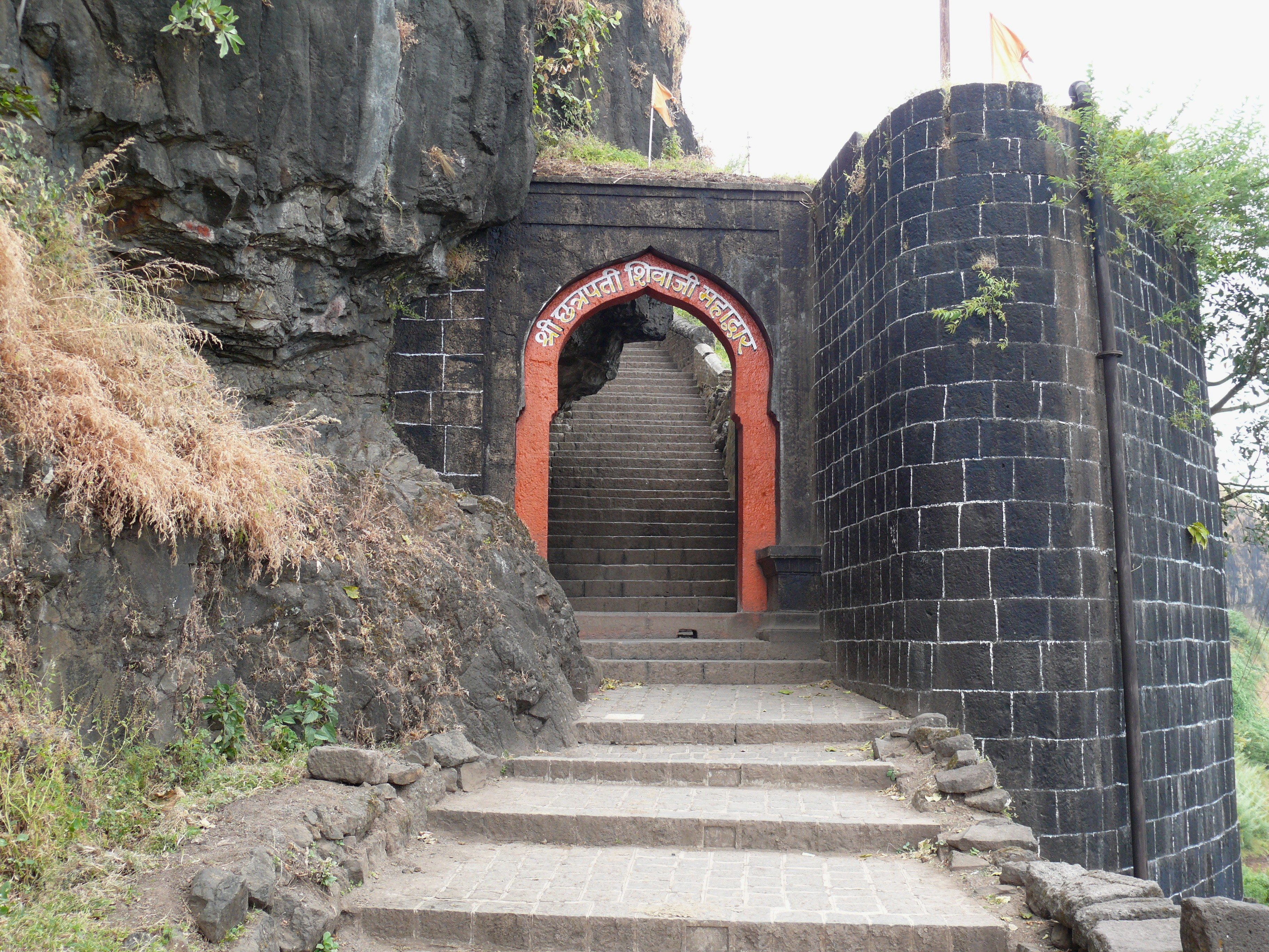 Chattrapati Shivaji Mahadarwaza (श्री छ॰ शिवाजी महाद्वार) Sajjangad entrance